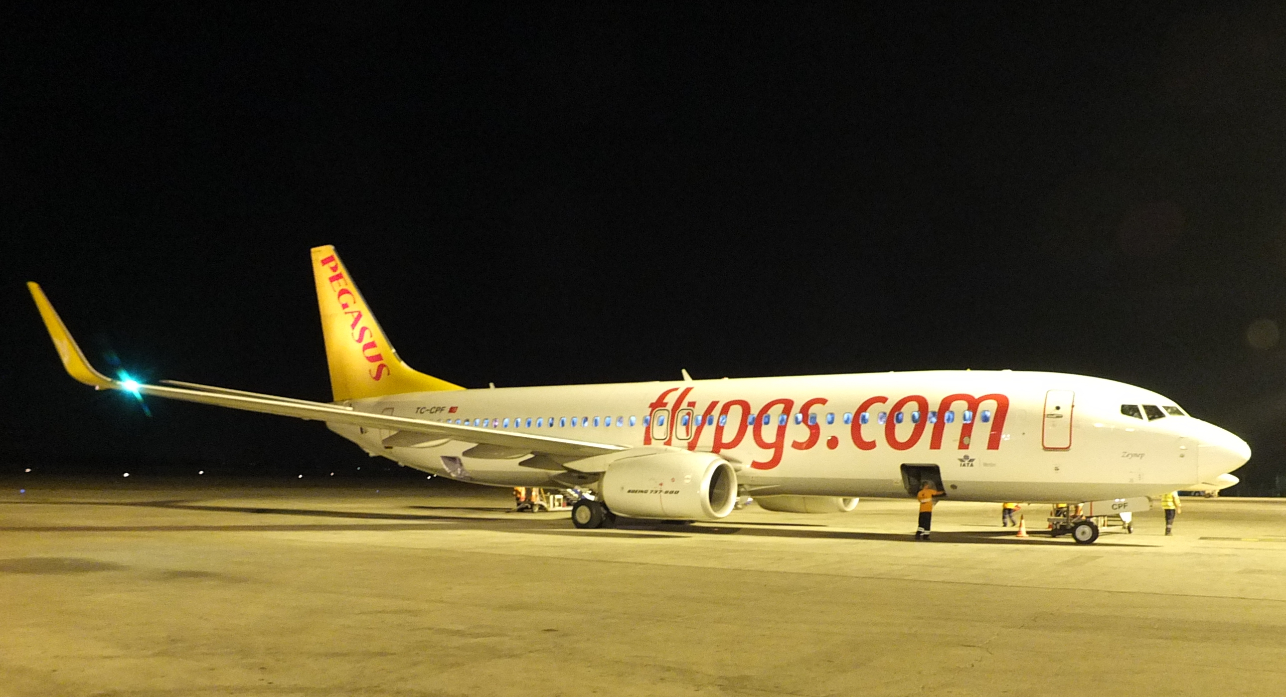 Pegasus Airlines 737-82R (Next Generation) TC-CPF (cn 40879/4267) op Ercan Airport (Noord-Cyprus).